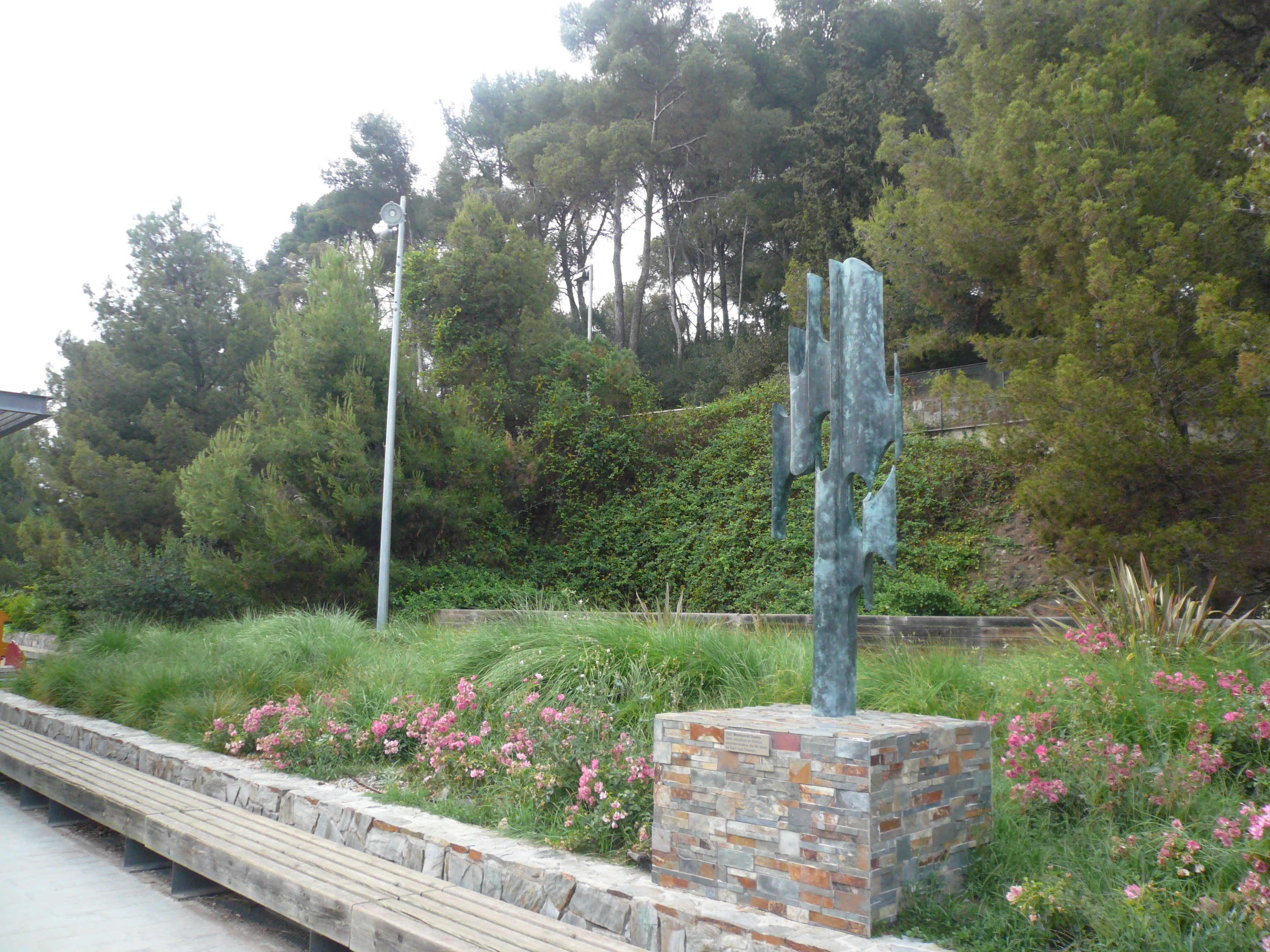 Pineda del Parc del Mil·lenari. Parc del Mil·lenari (Sant Just Desvern, Baix Llobregat). Varis. This is a a photo of a protected or outstanding tree in Catalonia, Spain, with id: MA-082212/ARBREDA Object location41° 23′ 03.76″ N, 2° 04′ 42.89″ E